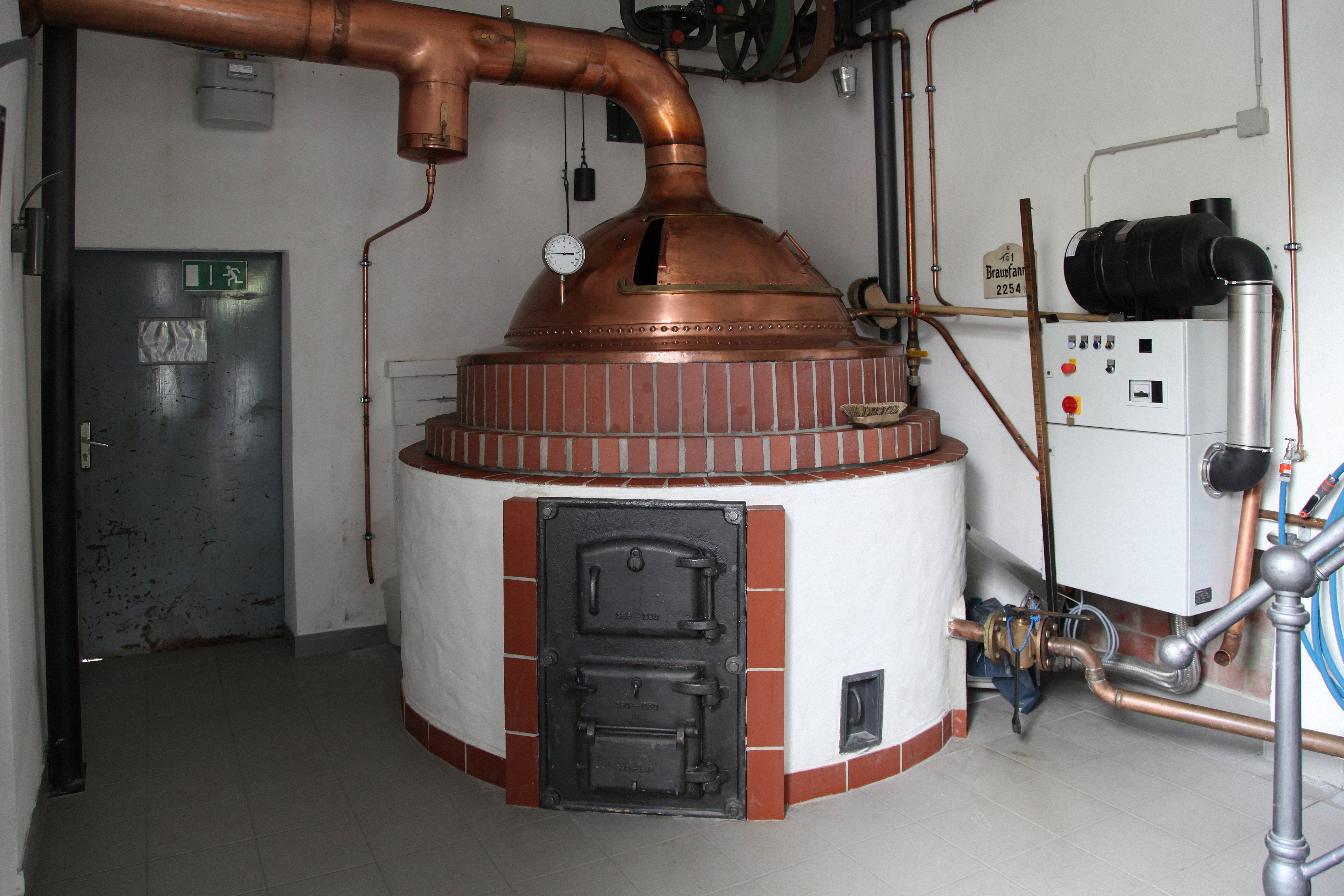 Historische Brennerei Rönsahl, jetzt Rönsaler Brauerei und Brennerei-/Brauereimuseum, Hauptstraße 23 in Rönsahl, Kierspe